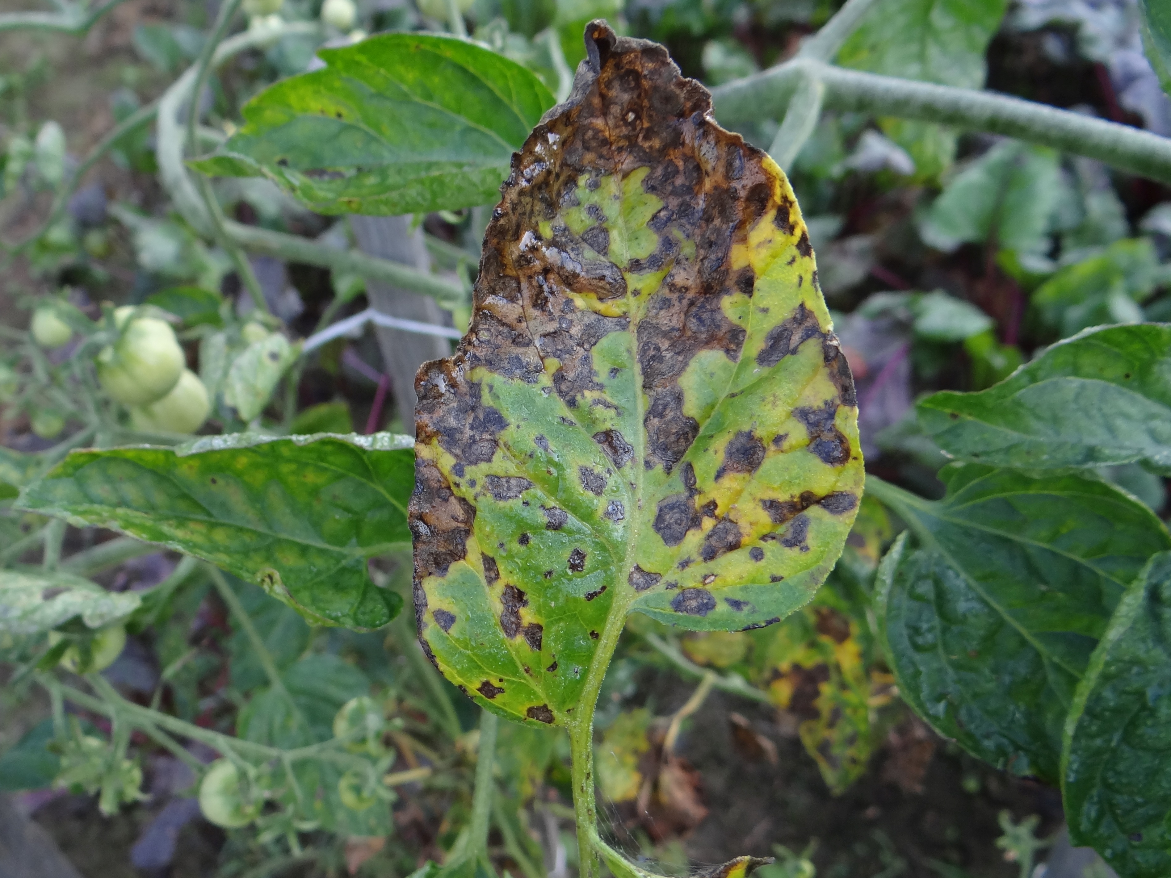 Alternaria solani on a leaf Solanum lycopersicon (top side)